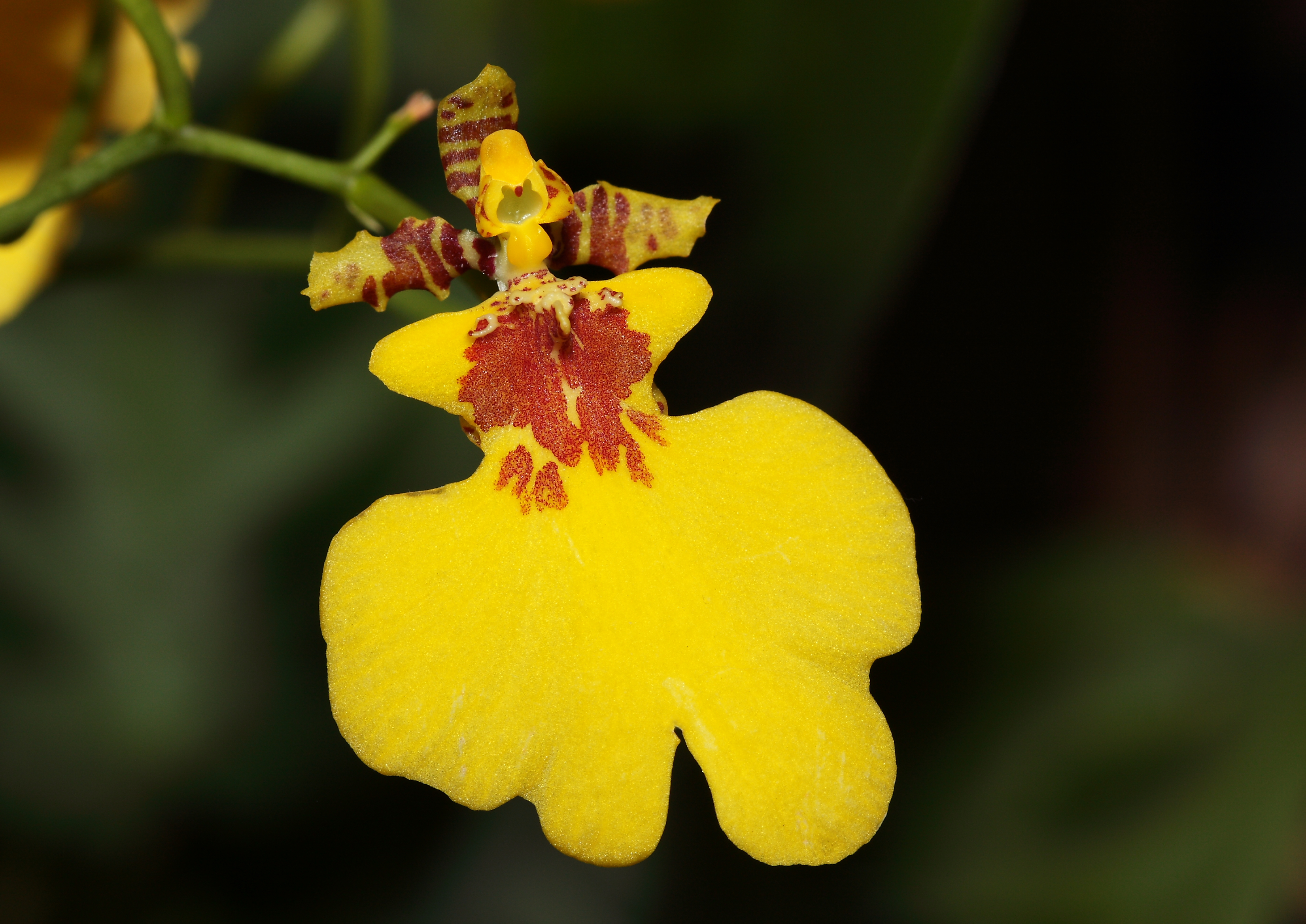 Oncidium varicosum Orchid